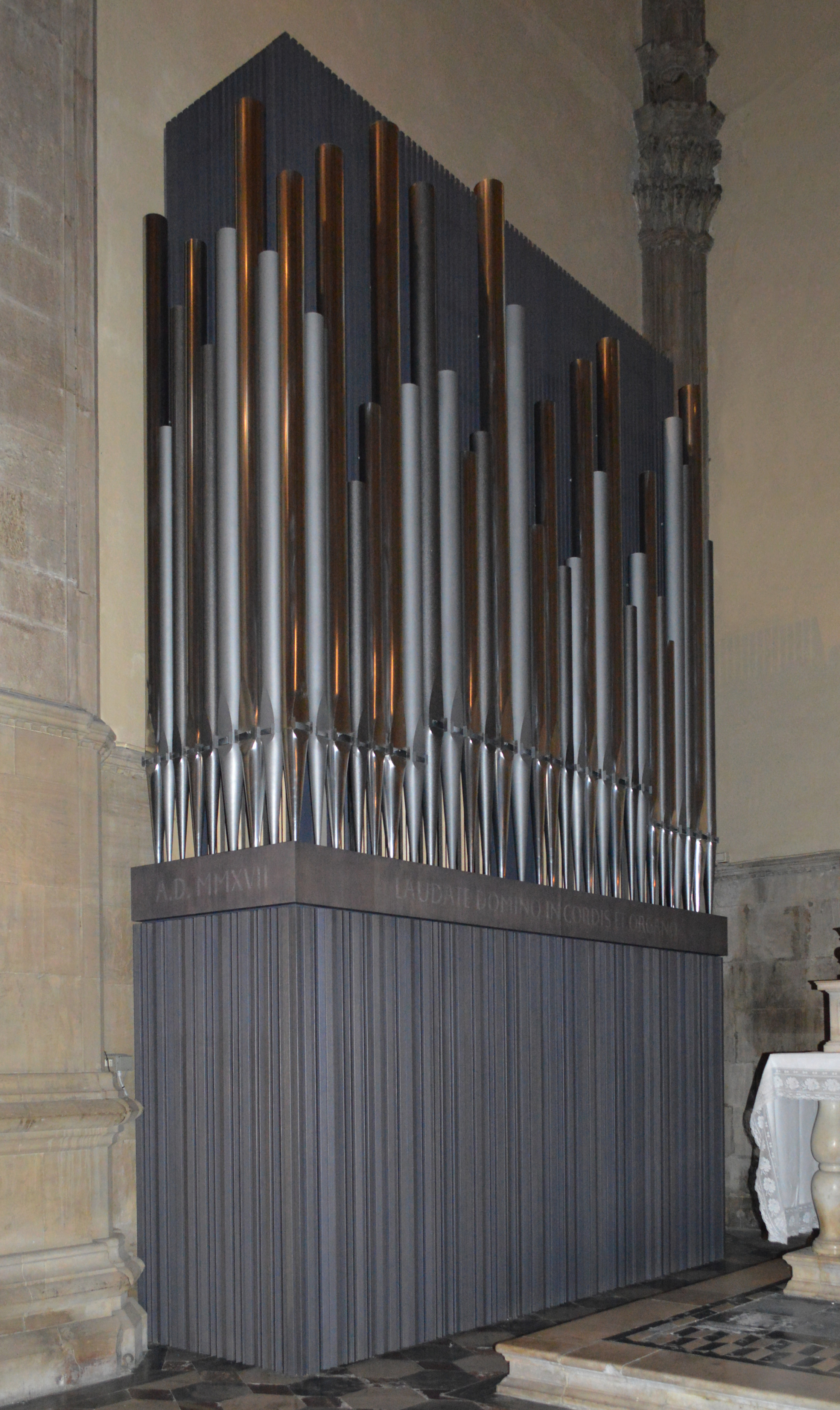 Il corpo eco, situato nella cappella di San Matteo.